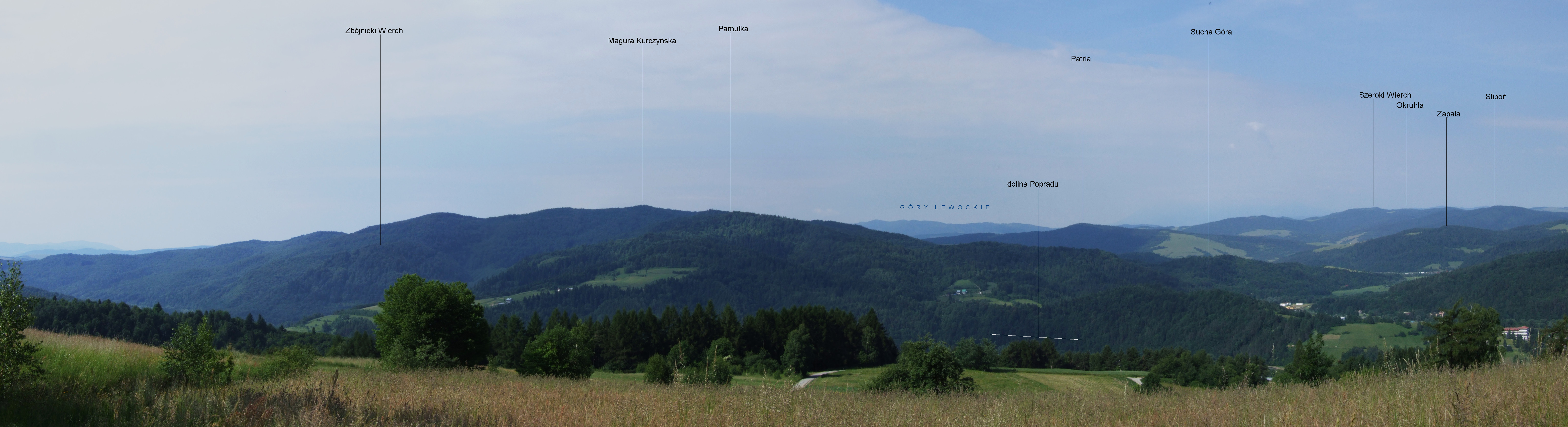 Widok z Malnika nad Muszyną